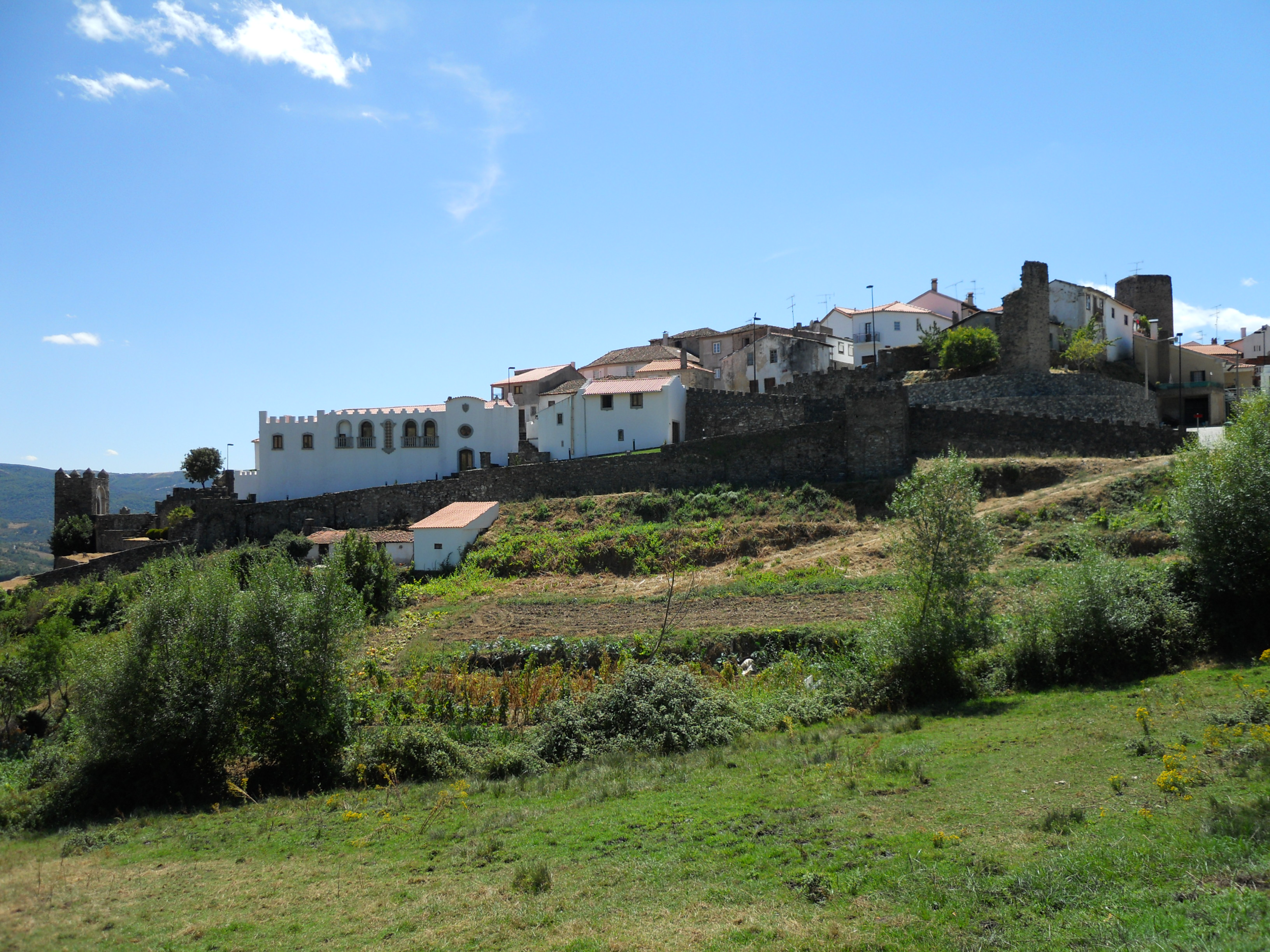 Murallas del castillo de Vinhais.